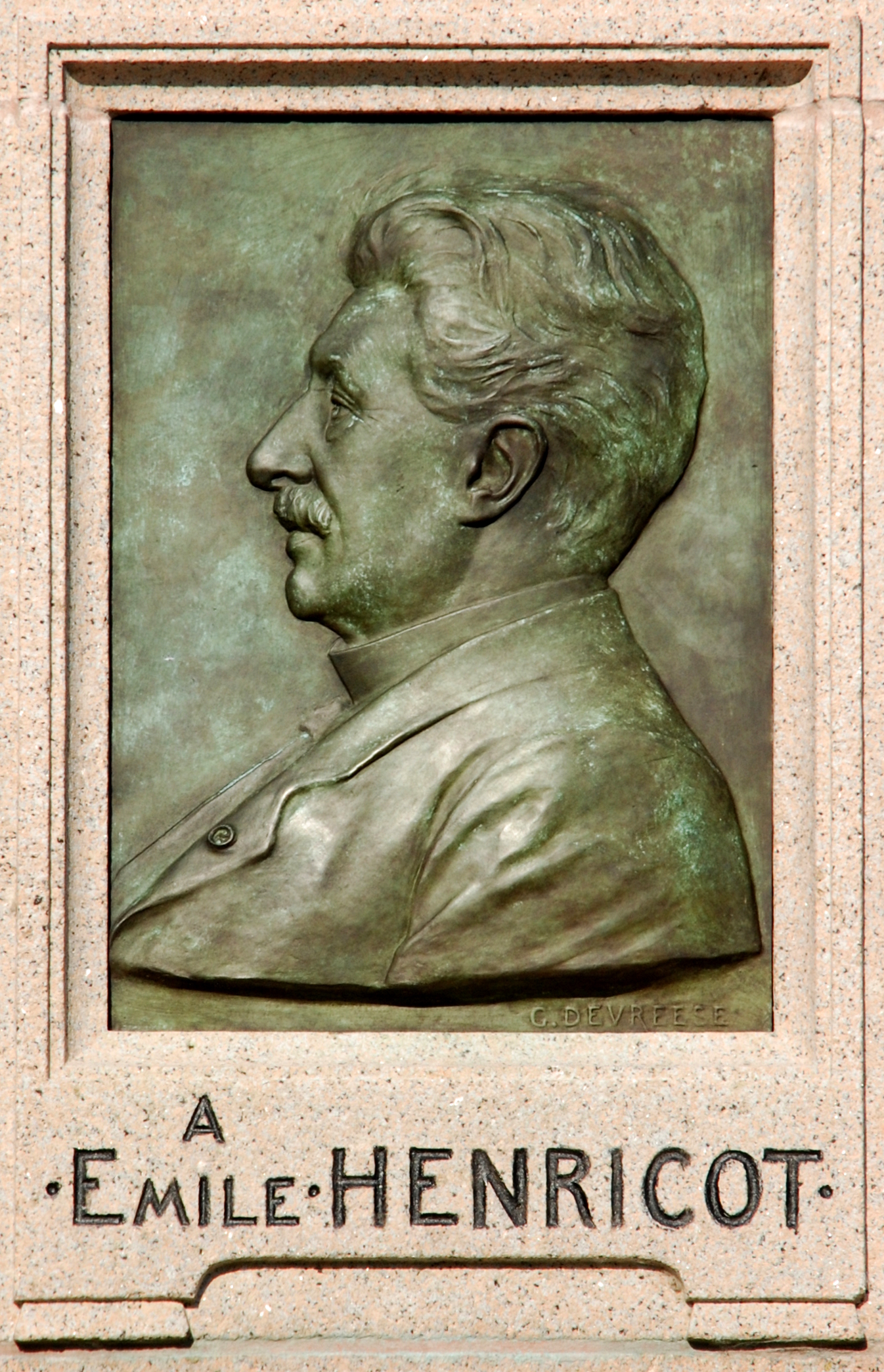 Belgique - Brabant wallon - Court-Saint-Étienne - Monument à Émile Henricot (bas-relief par Godefroid Devreese)